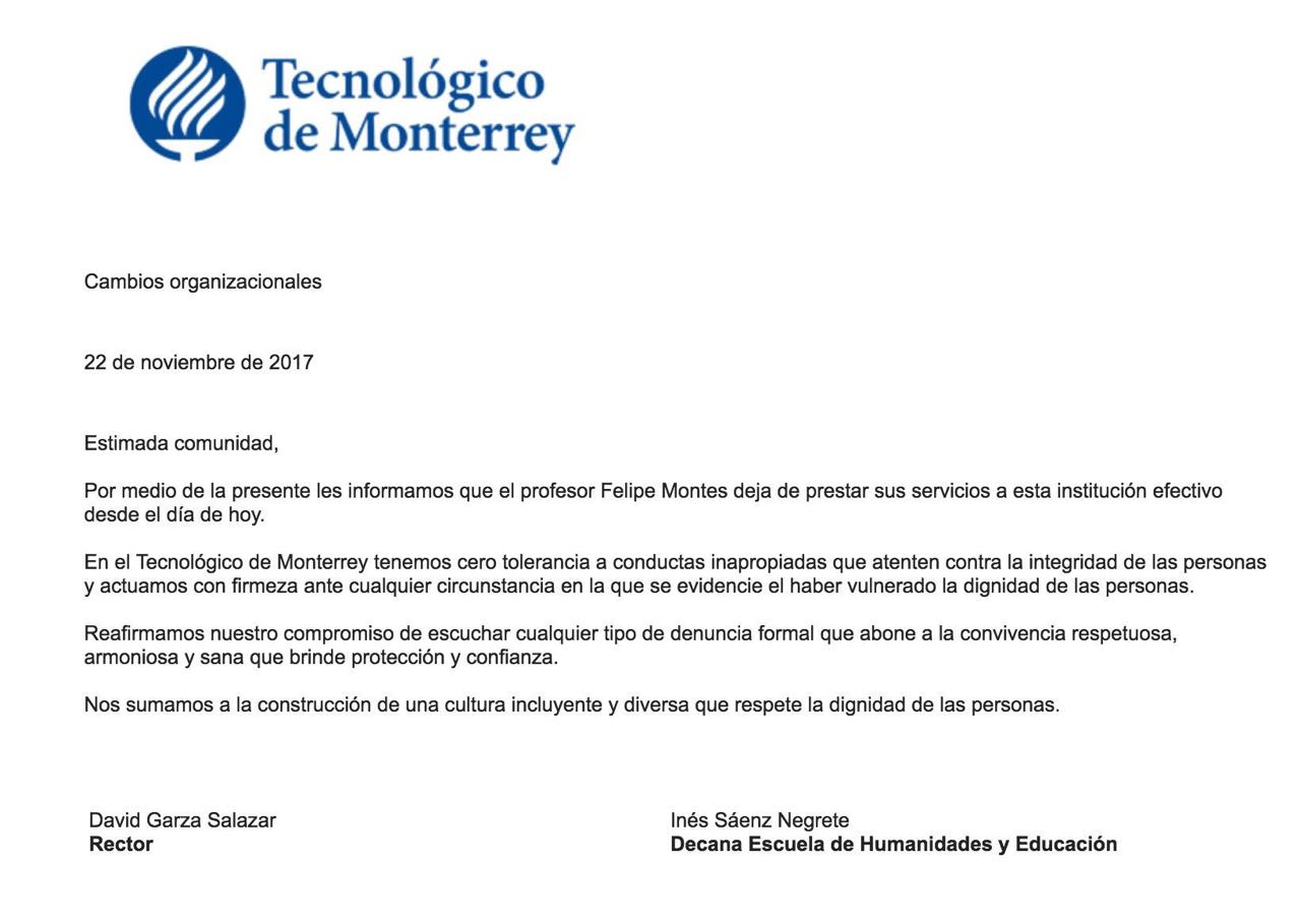 Comunicado de expulsión de Felipe Montes del Tecnológico de Monterrey tras las acusaciones por acoso y abuso sexual contra sus alumnas.